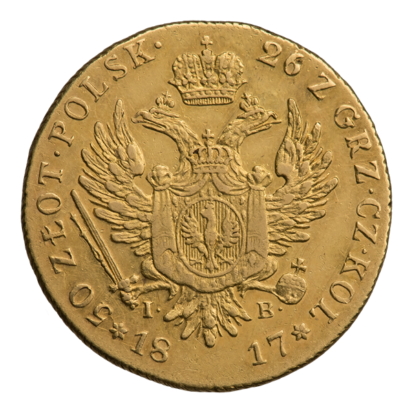 Пятьдесят злотых 1817 г. (реверс). ГМ 6.I.6; Биткин 804 (R1). Под императорской короной двуглавый орёл, на груди орла мантия и под королевской короной щит с гербом царства Польского. В лапах орла скипетр, меч и держава. Под орлом инициалы минцмейстера: I — B (Jacub Benik). Внизу дата: 18 — 17. Круговая надпись: * 50 ZŁOT∙ POLSK∙ 26 Z GRZ∙ CZ∙ KOL *